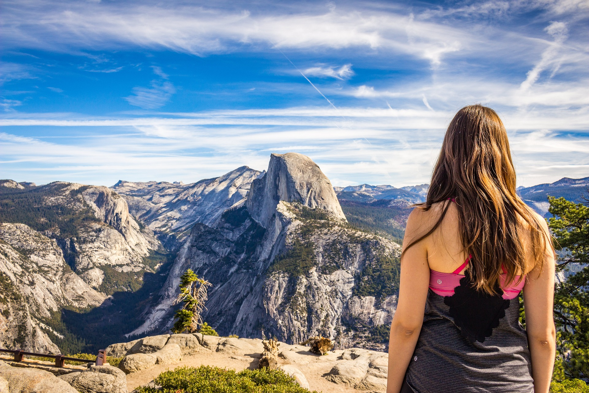 Une femme de jour face à un paysage montagneux